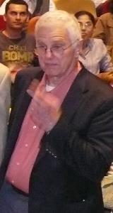 Bruce Alberts.